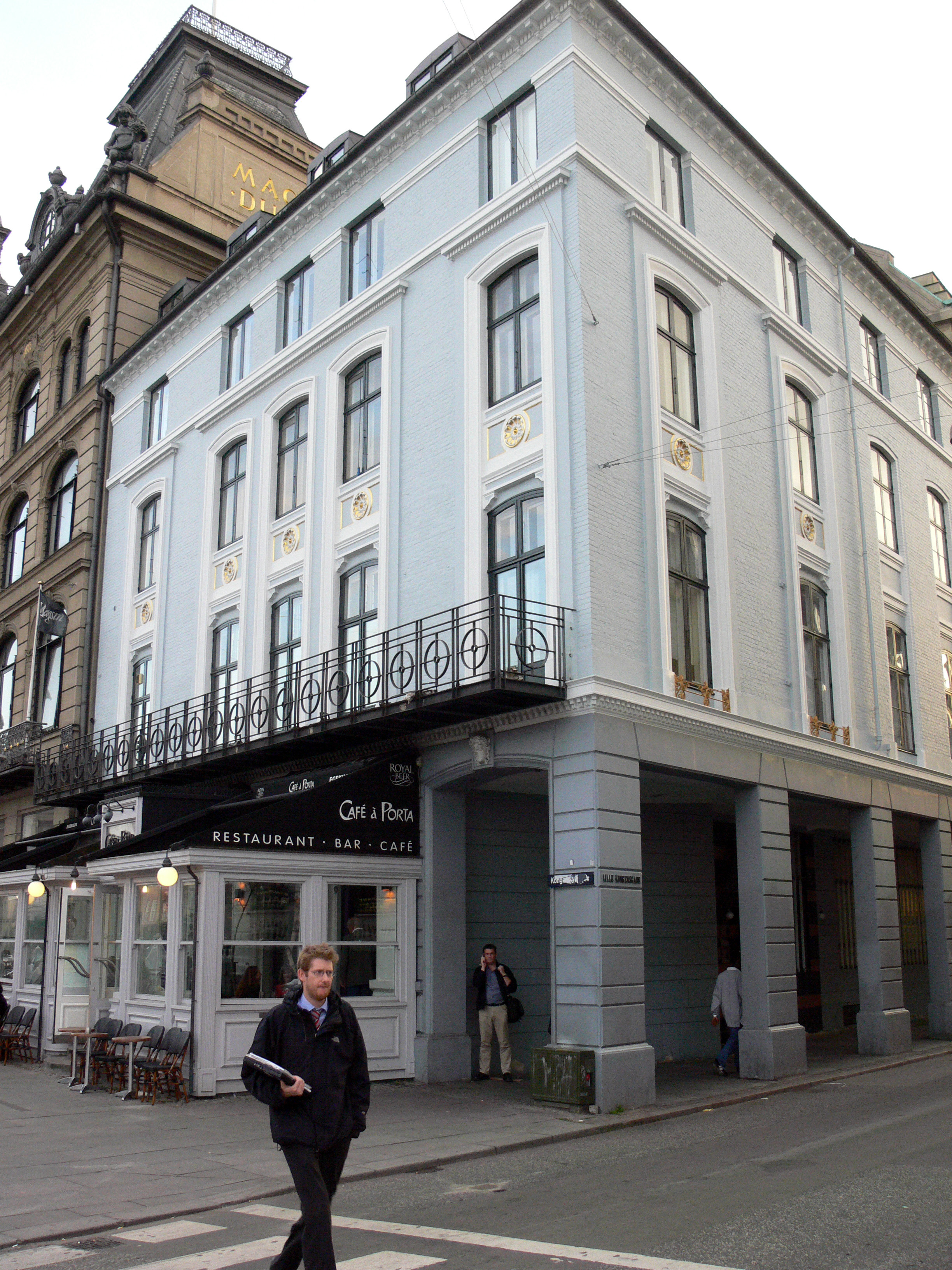 Café a Porta am Kongens Nytorv in Kopenhagen.